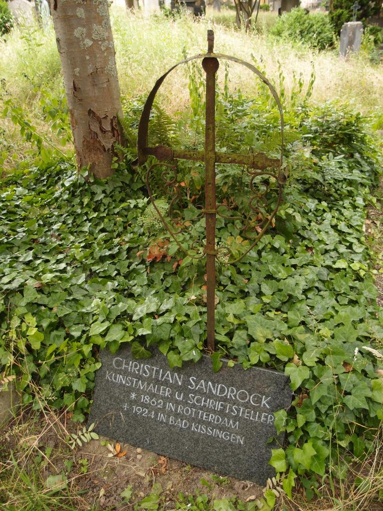 Grab des Malers und Schriftstellers Christian Sandrock (1865-1924) auf dem Kapellenfriedhof in Bad Kissingen.